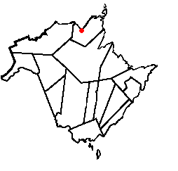 Bathurst, New Brunswick